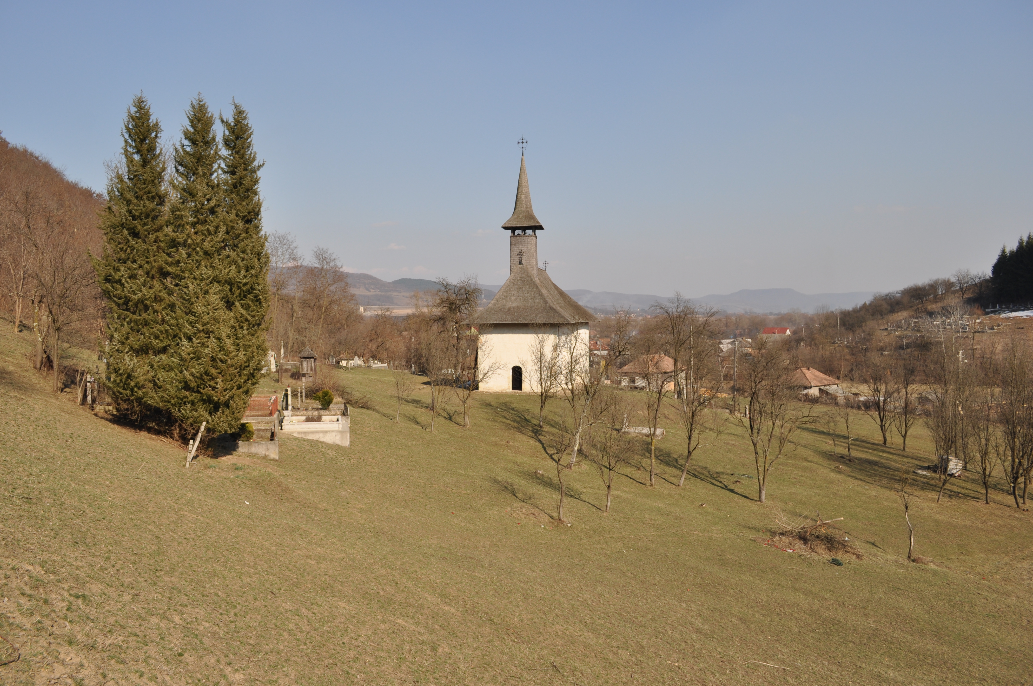 Biserica "Adormirea Maicii Domnului" a mănăstirii Vadului , sat Vad, județul Cluj